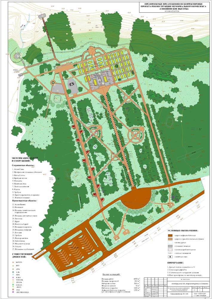 Проект реконструкции мемориала "Синявинские высоты", автор архитектор-реставратор Сергей Дунаев